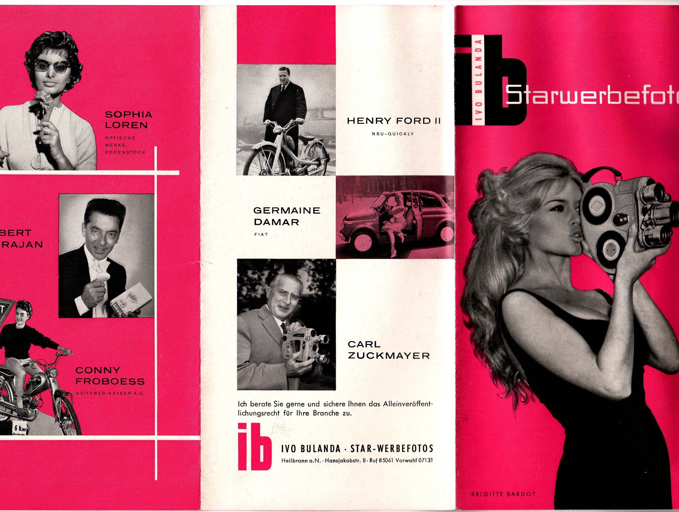 Werbeflyer aus den 1960er Jahren